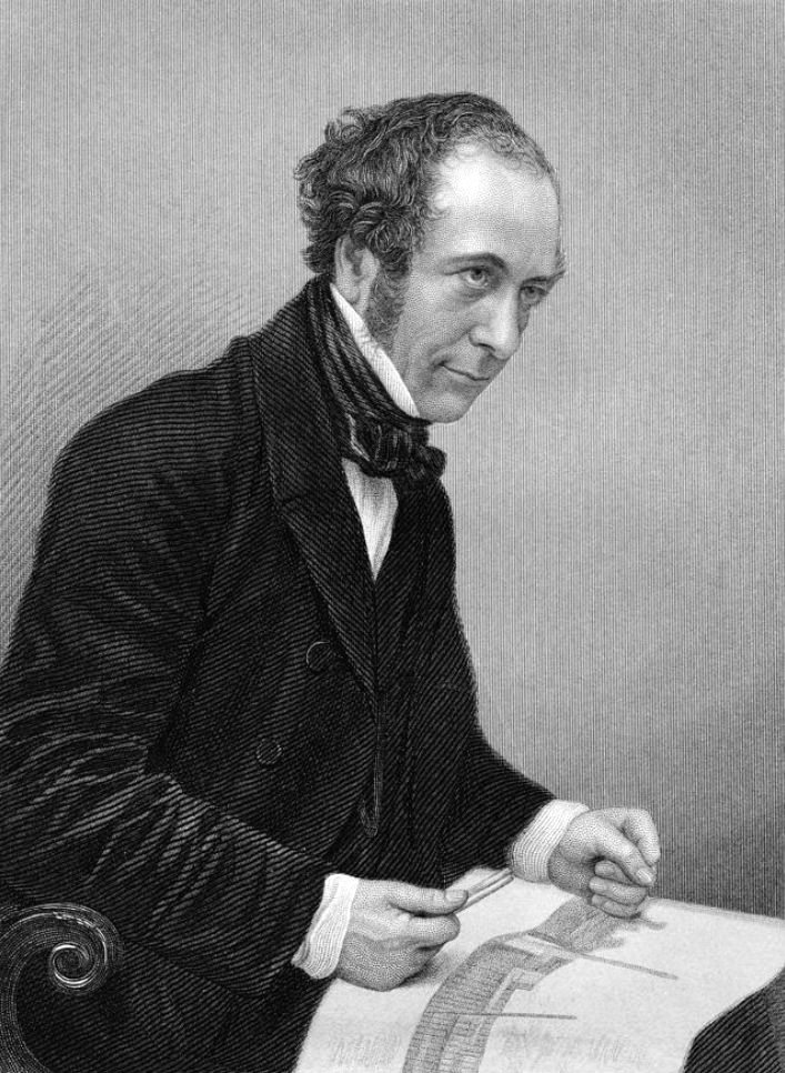 John Scott Russell skót mérnök portréja